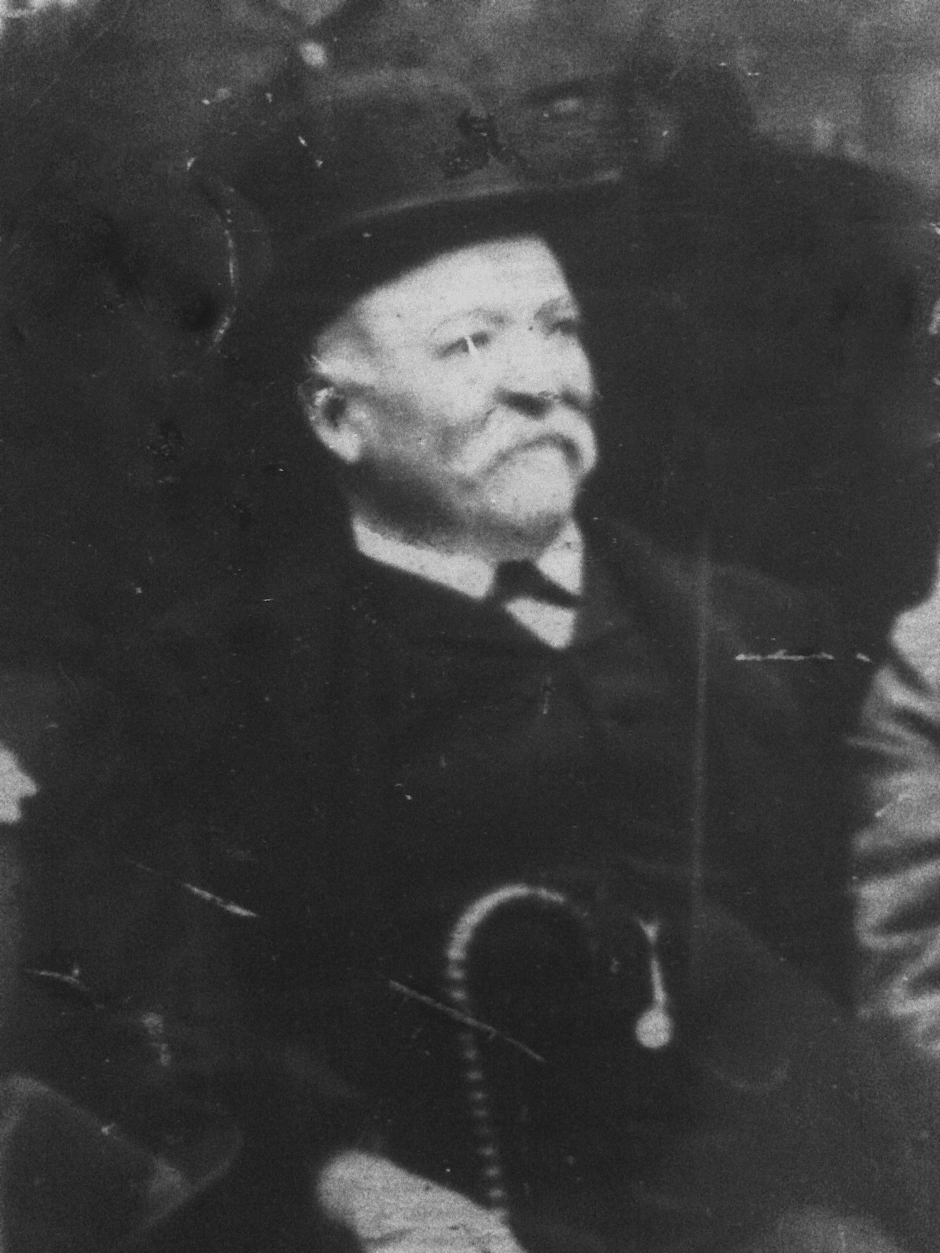 Inmigrante italiano, primer Industrial del Chaco